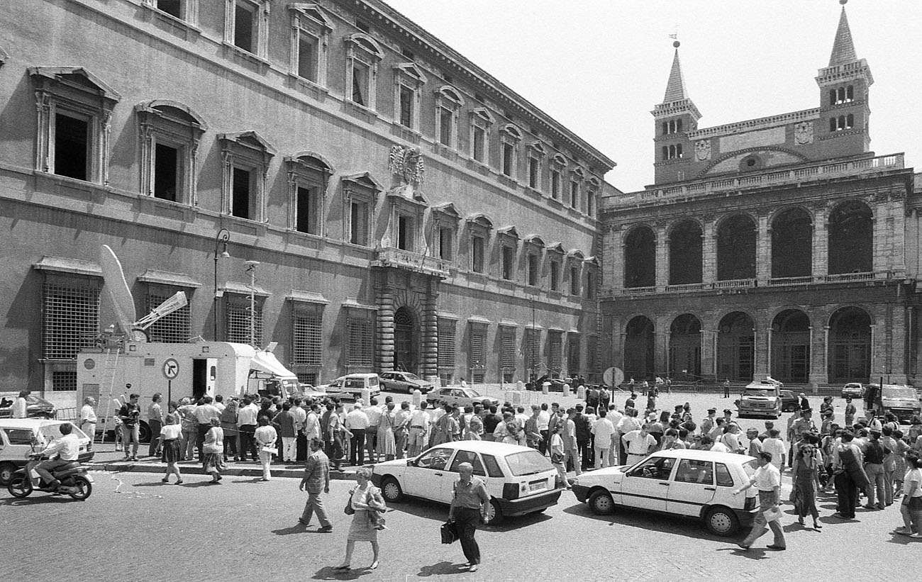 Attentato al Laterano del 27 luglio 1993